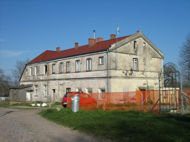 Zabytkowy dom w Mokrzycy Małej